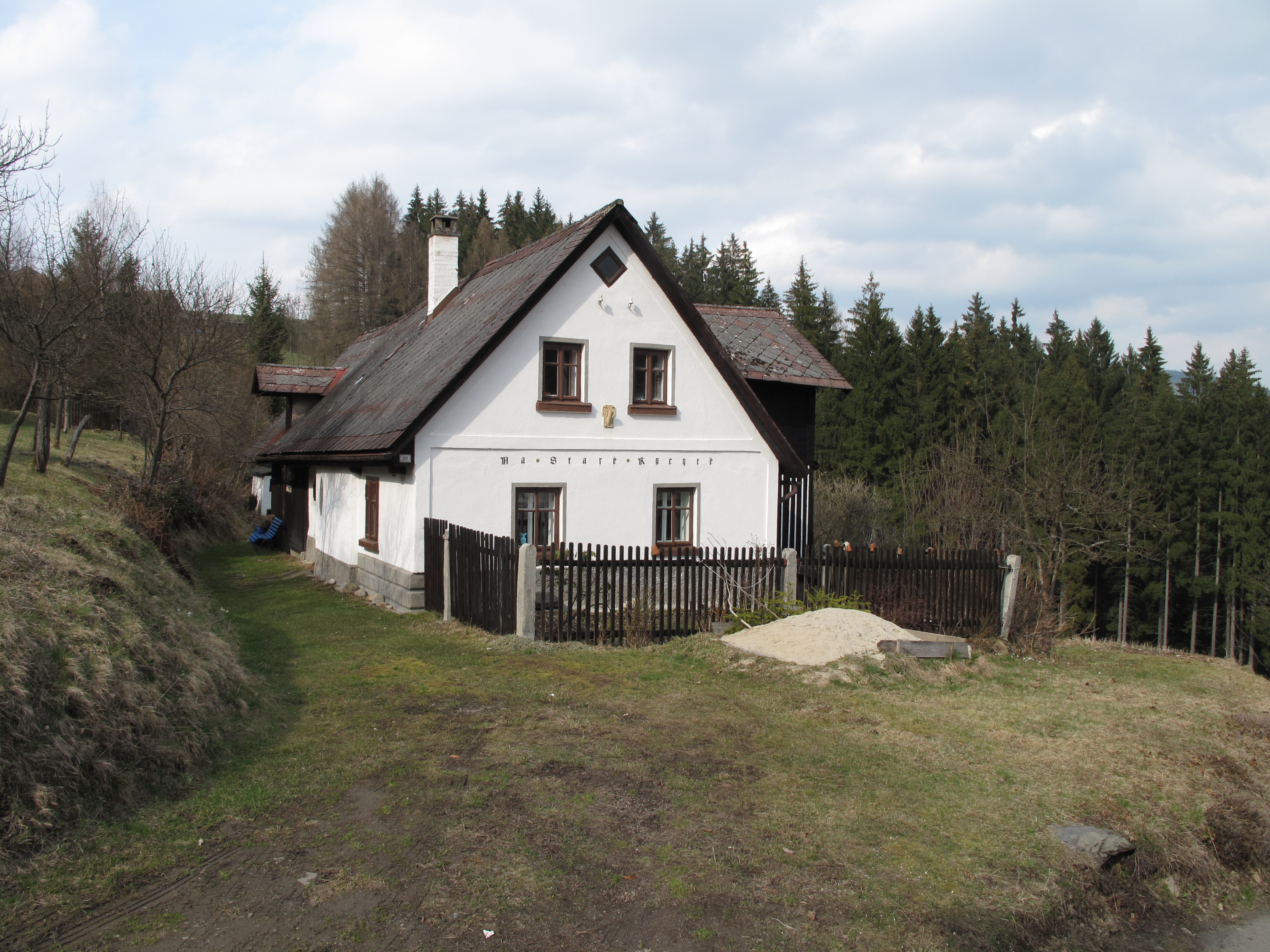 Dům ve Lhotce. Okres Jablonec nad Nisou, Česká republika.